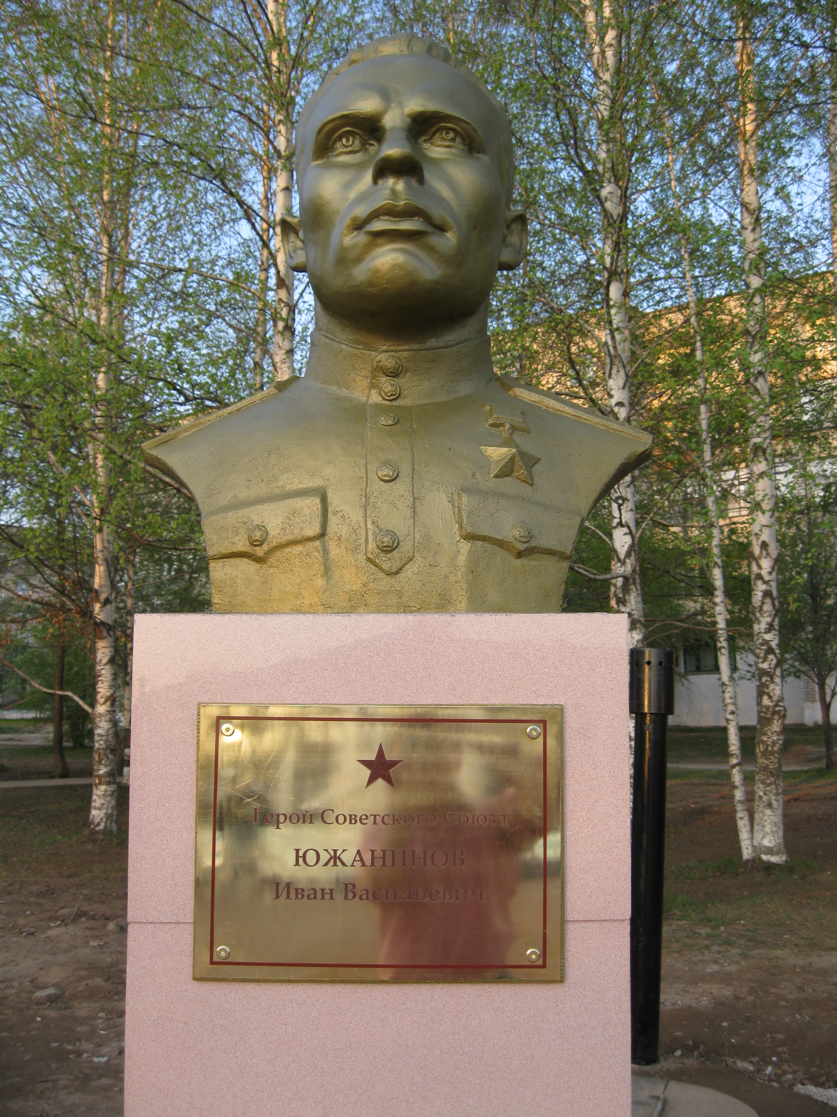 Бюст Ивана Васильевича Южанинова на Аллее Славы, открытой 09.05.2010 года в городе Чернушка.